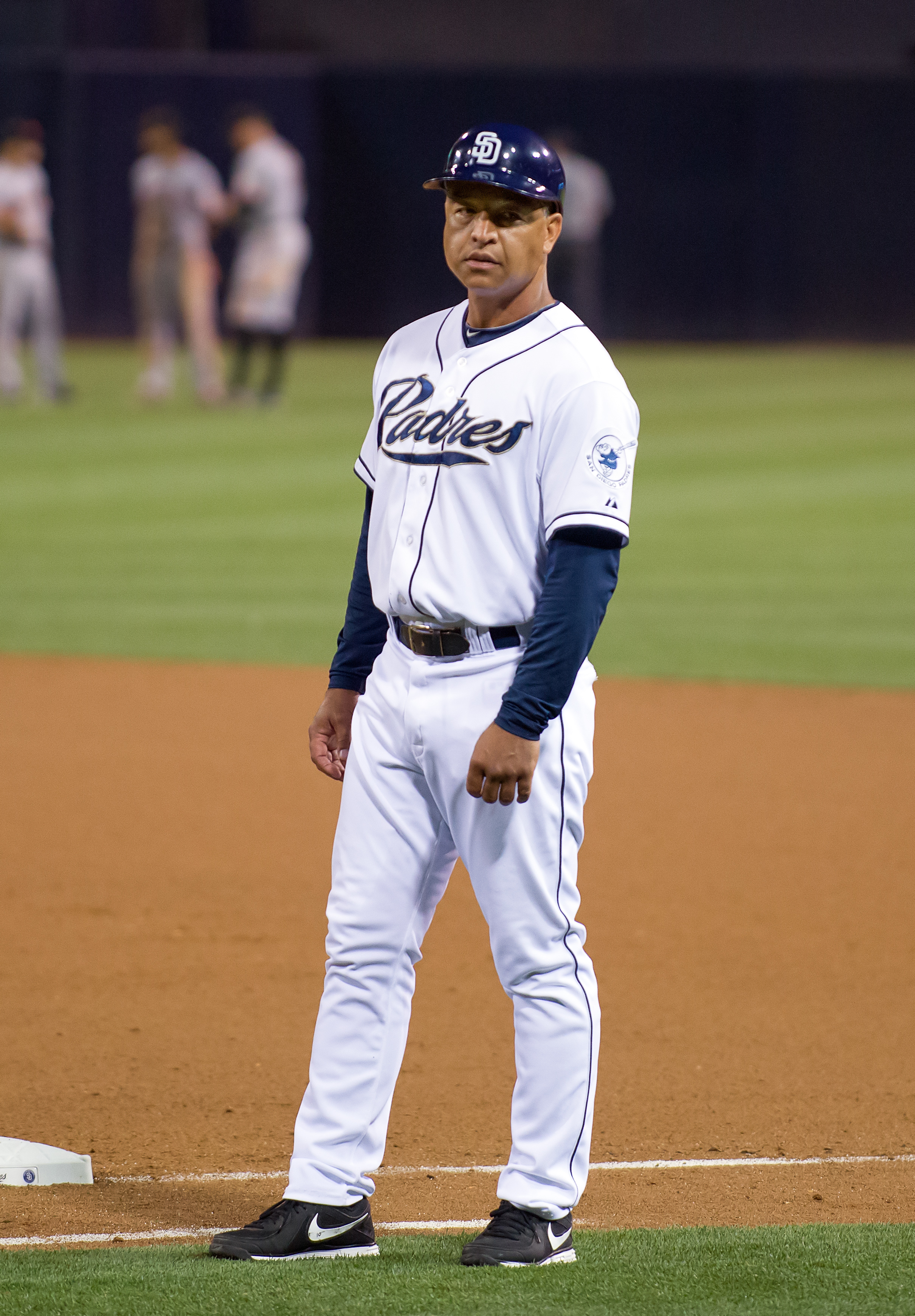 Dave Roberts